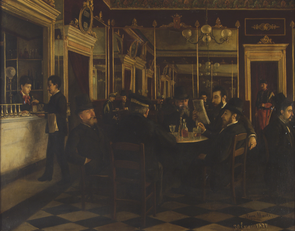 Oli sobre tela de Jaume Pons Martí